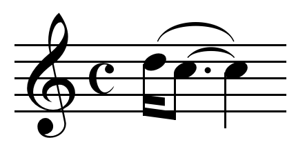 Appogiatura execution